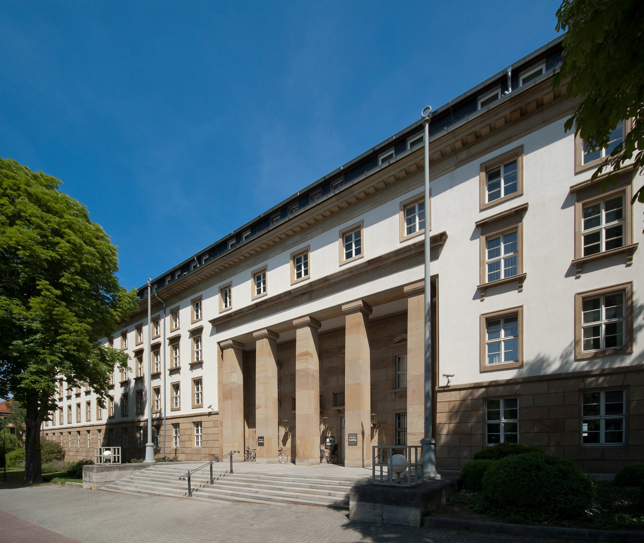 Landtagsgebäude in Erfurt